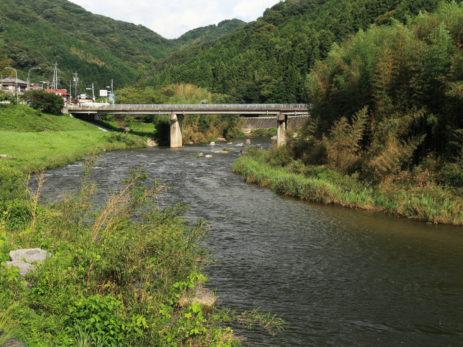 巴川（豊田市則定町、2011年）